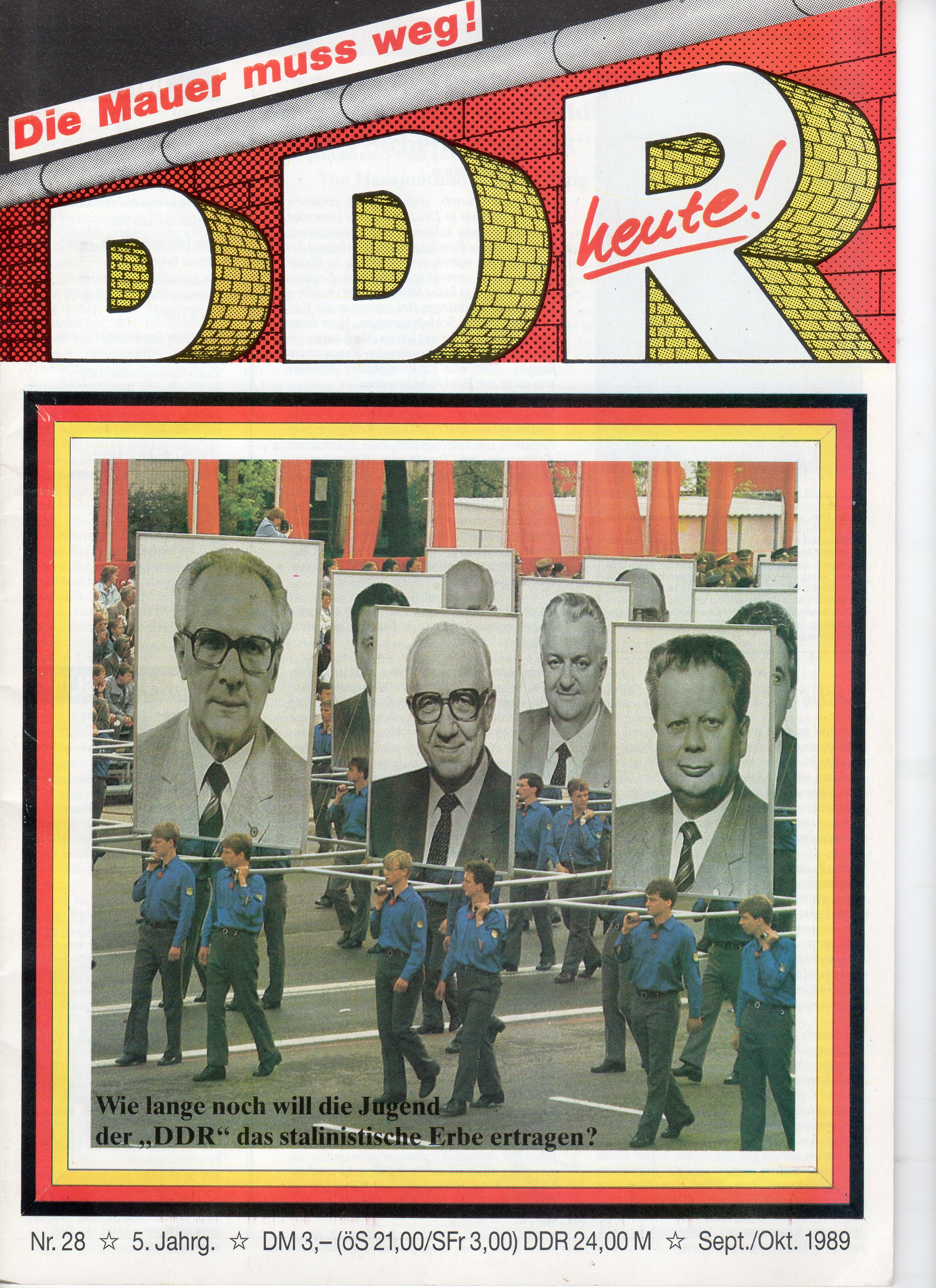 DDR heute in Farbe